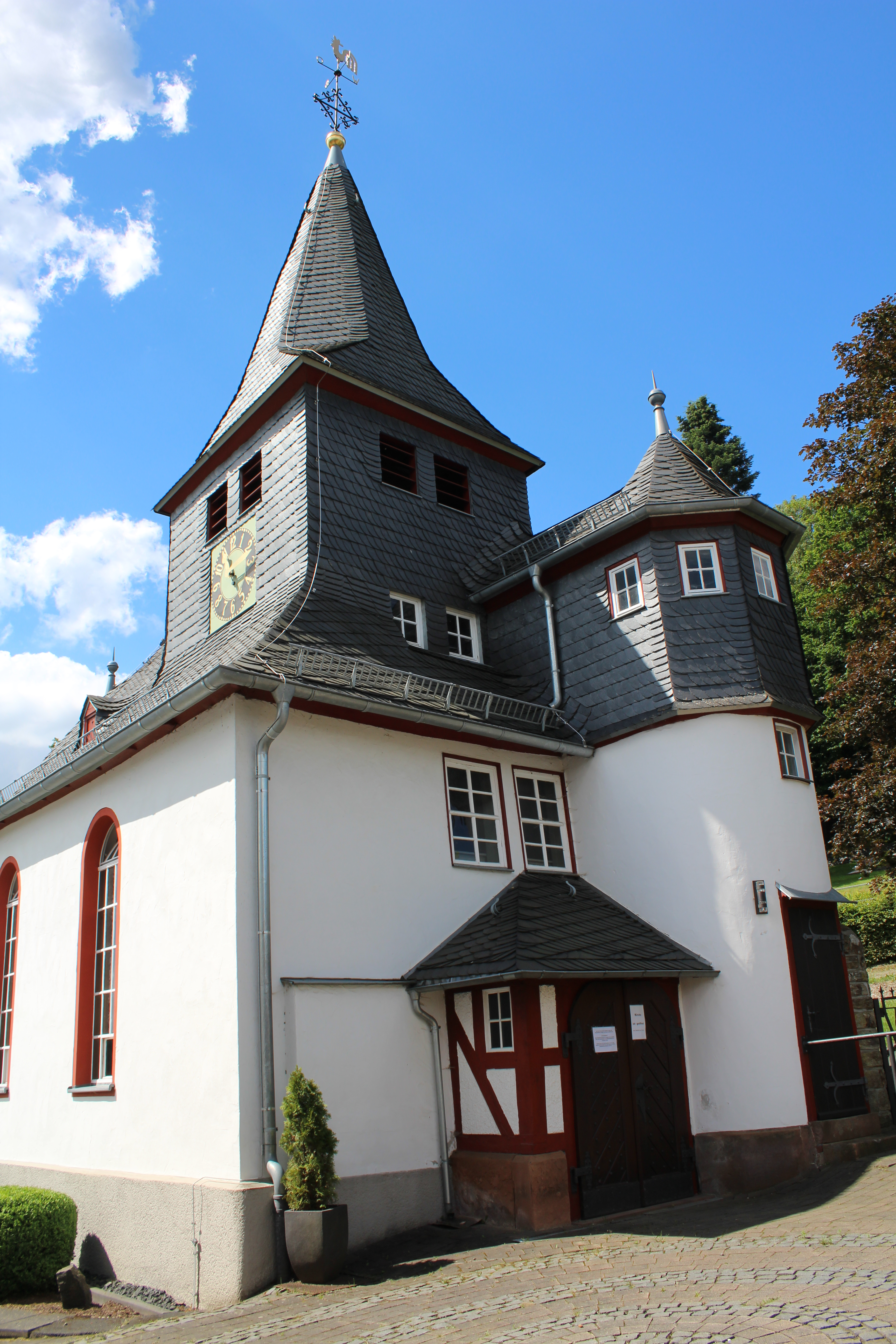 Ev. Kapelle Steinbrücken, Gemeinde Dietzhölztal, Hessen, Deutschland